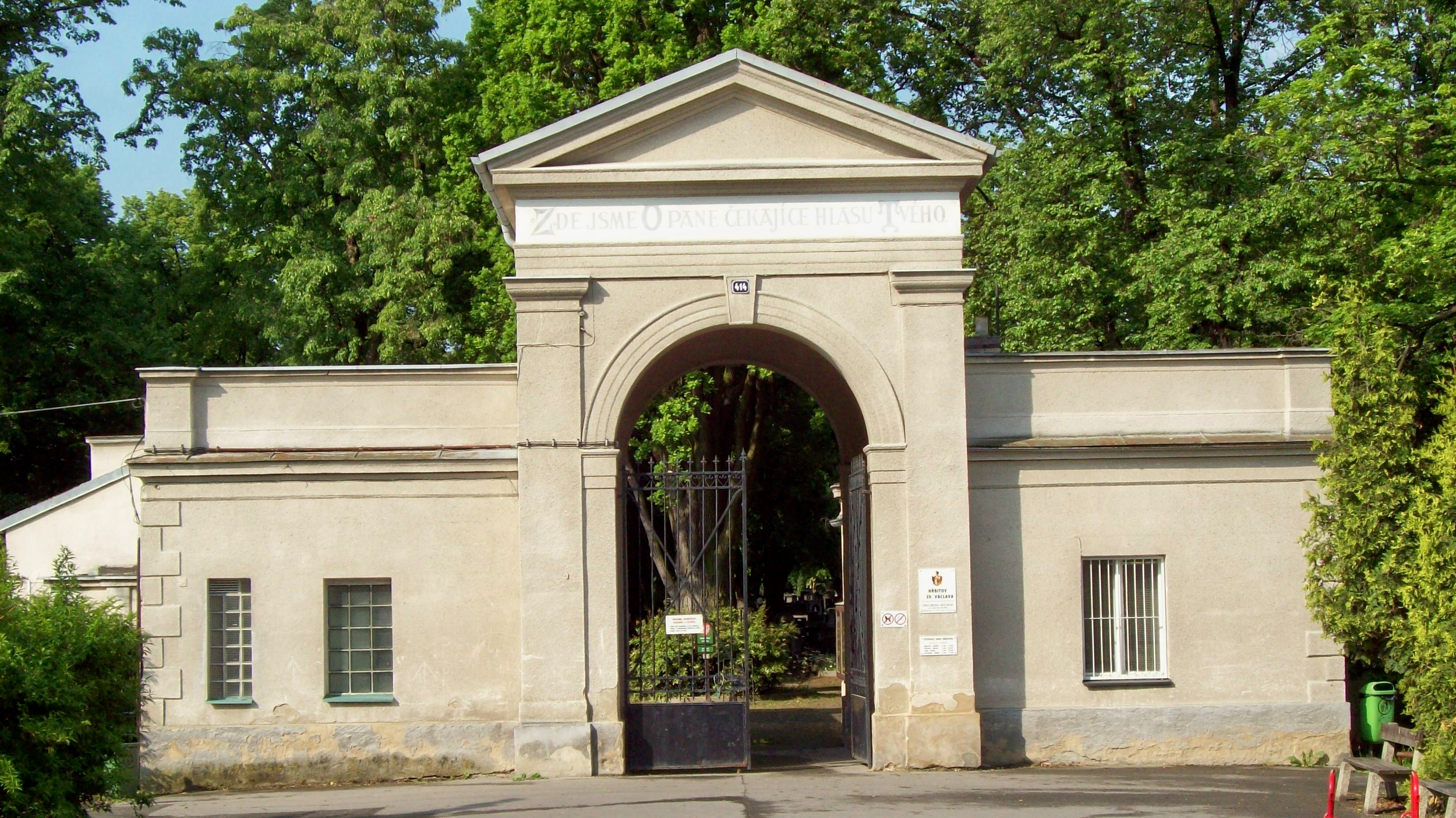 Hřbitov sv. Václava v Mělníku, Pražská ulice č.p. 414. Vstupní brána.Nápis nad bránou: ZDE JSME O PANE ČEKAJÍCE HLASU TVÉHO.